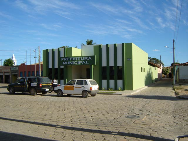 Prédio da prefeitura de Santa Rita de Cássia, cidade do interior da Bahia.